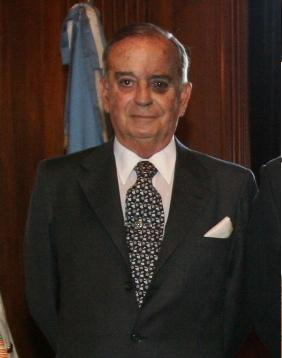 Enrique Santiago Petracchi, juezde la Suprema Corte de la República Argentina